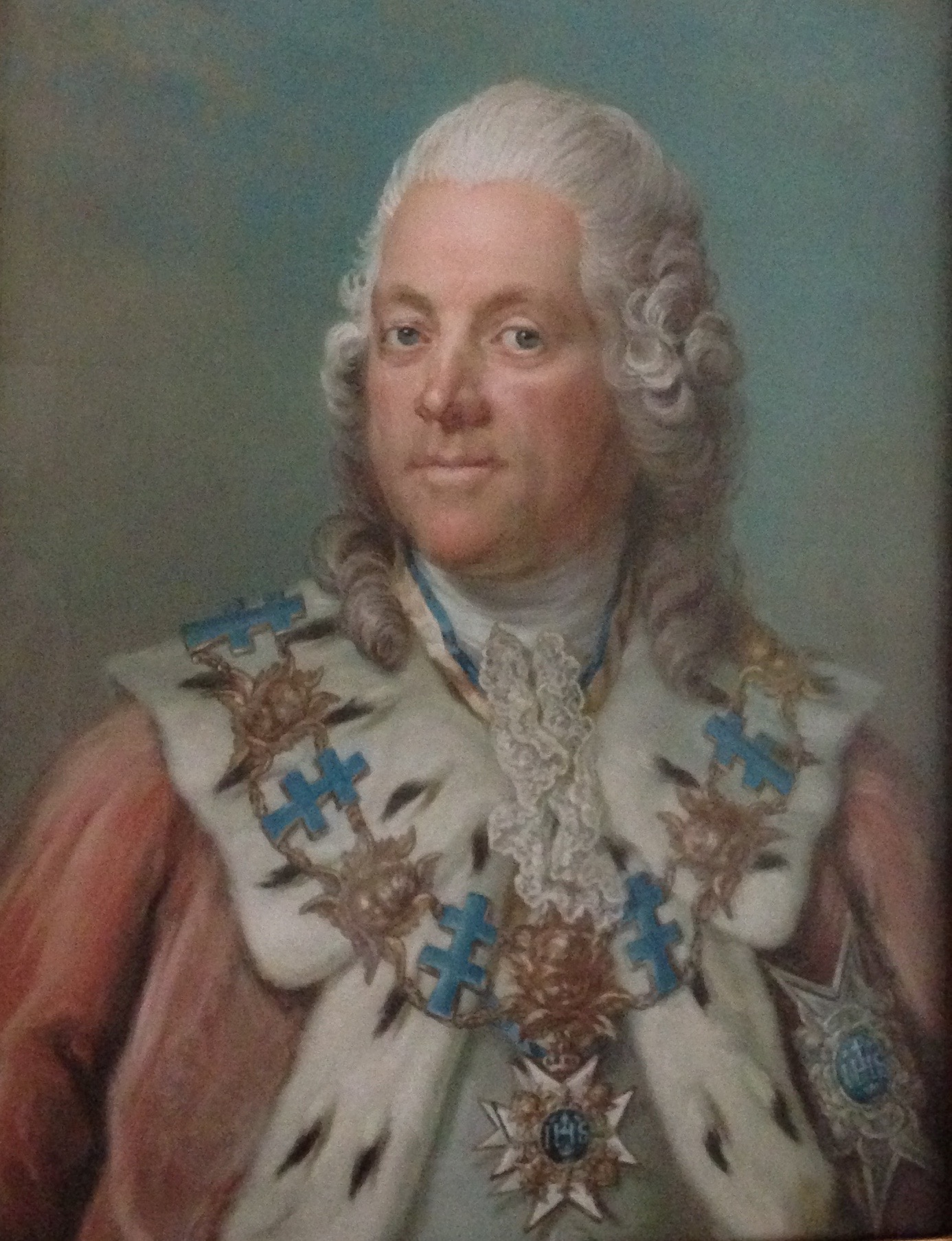 Fredrik Carl Sinclair (1723–1776)